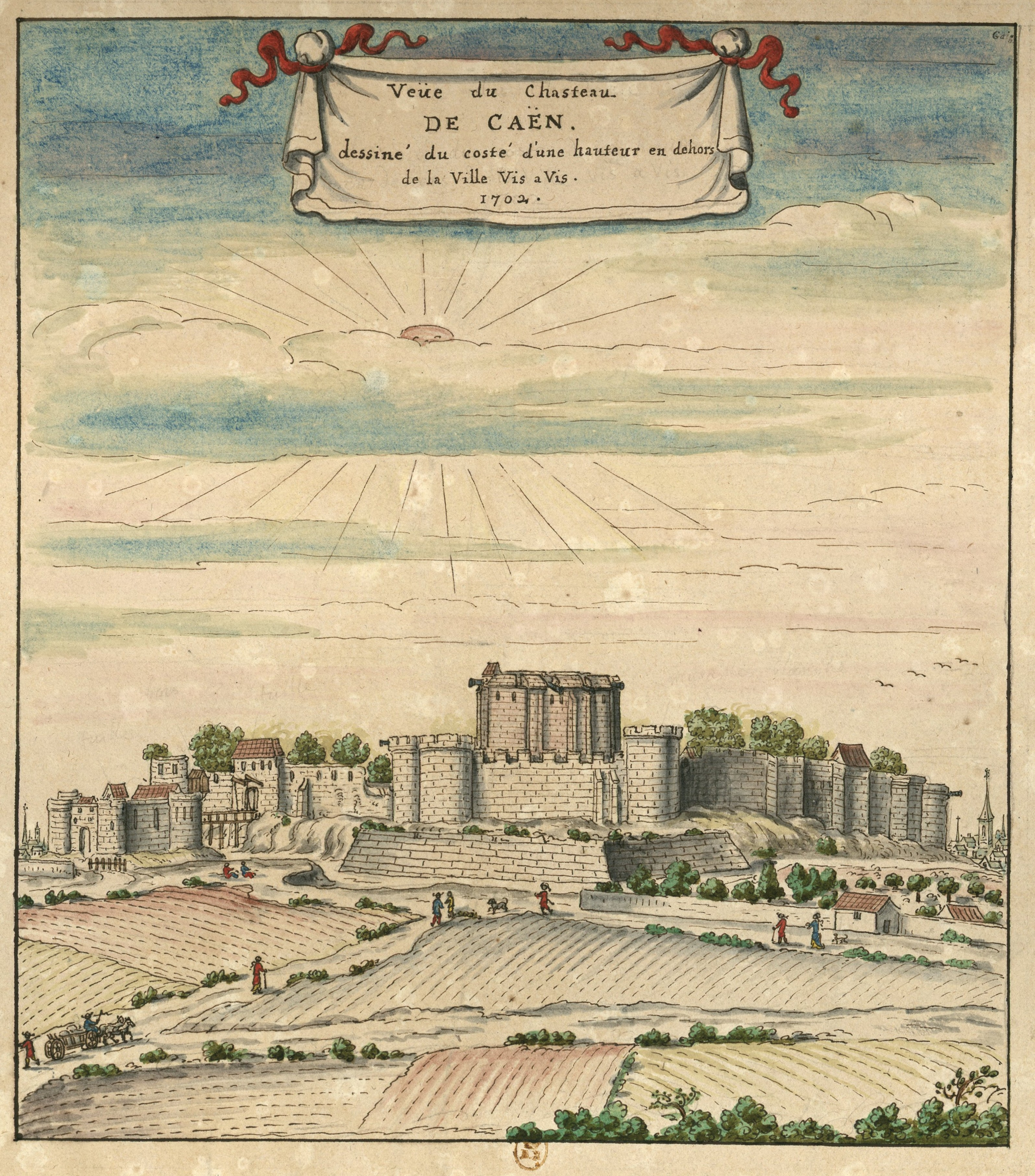 « Veüe du chasteau de Caen dessiné du costé d'une hauteur en dehors de la Ville vis a vis »